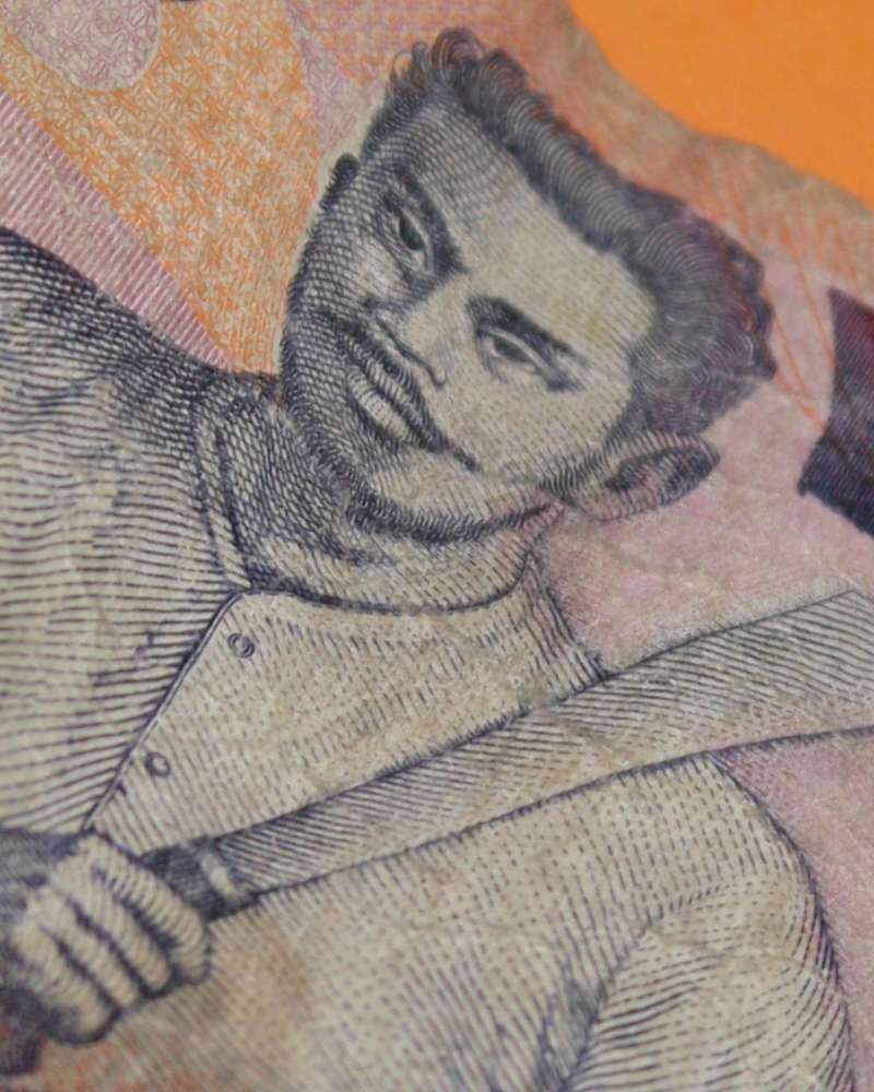 Pangeran pattimura